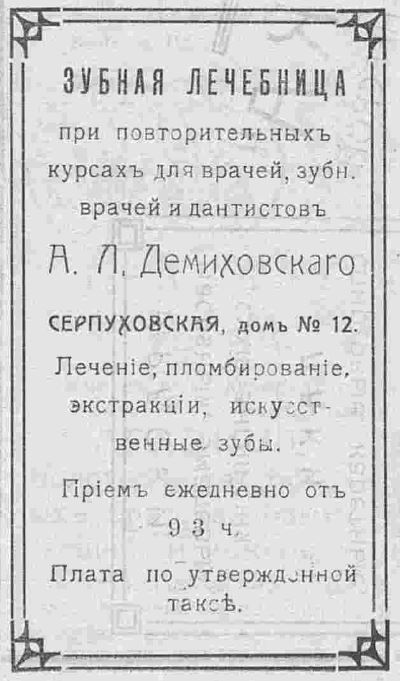 Рэклама зубной лячэбніцы ў доме Воліна ў Менску.